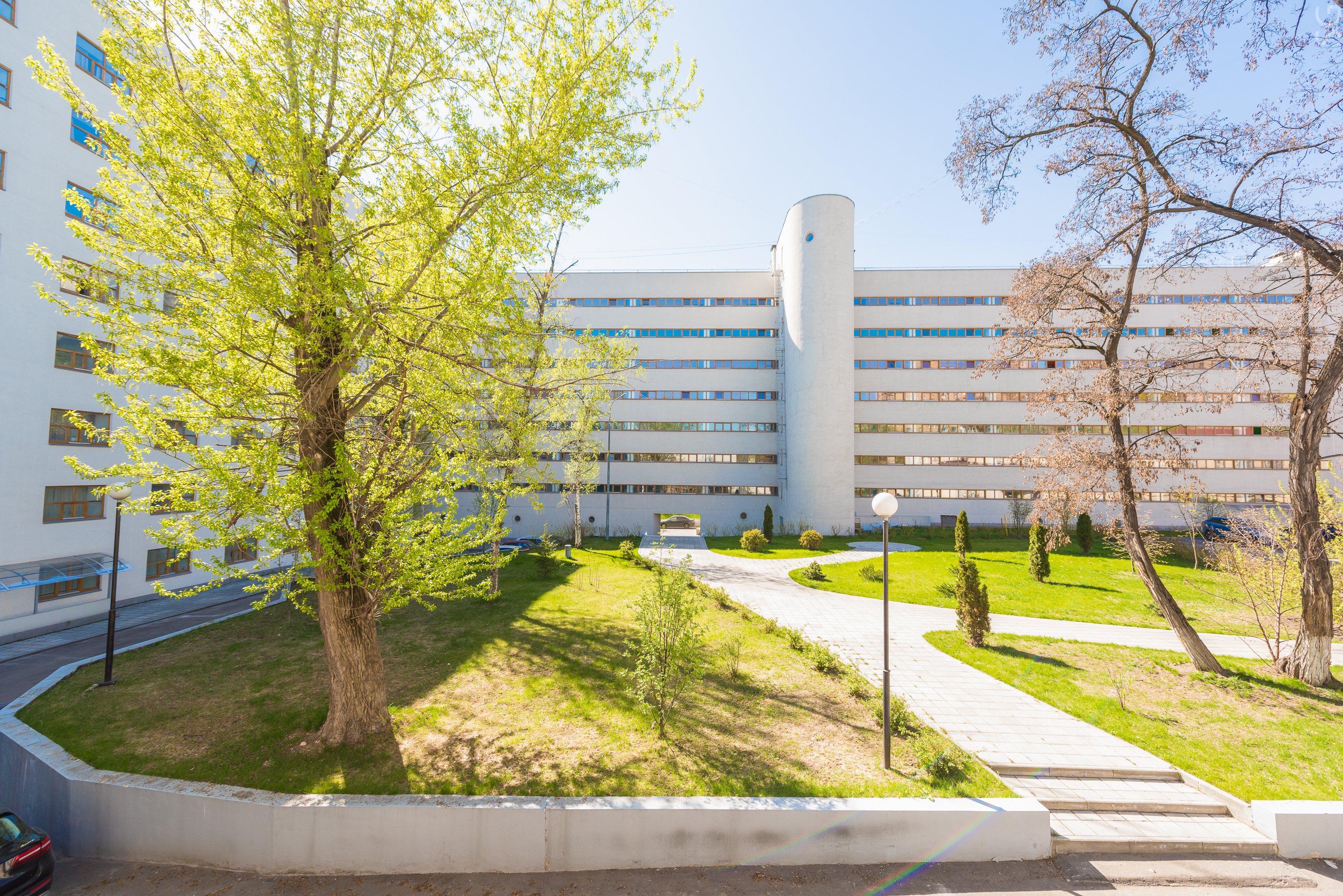 Памятник архитектуры в стиле конструктивизма по адресу: Москва, 2ой Донской проезд, дом 9. Общежитие магистров и аспирантов Национального исследовательского технологического университета "МИСиС"